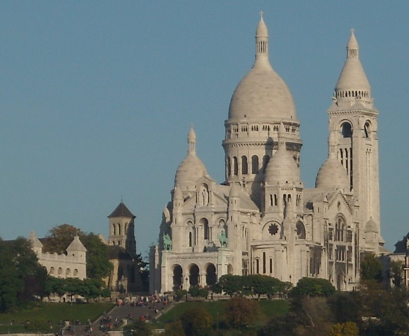 De gauche à droite : le réservoir d'eau potable de Montmartre l'église Saint-Pierre la basilique du Sacré-Cœur Photographie prise depuis l'église Saint-Vincent-de Paul.